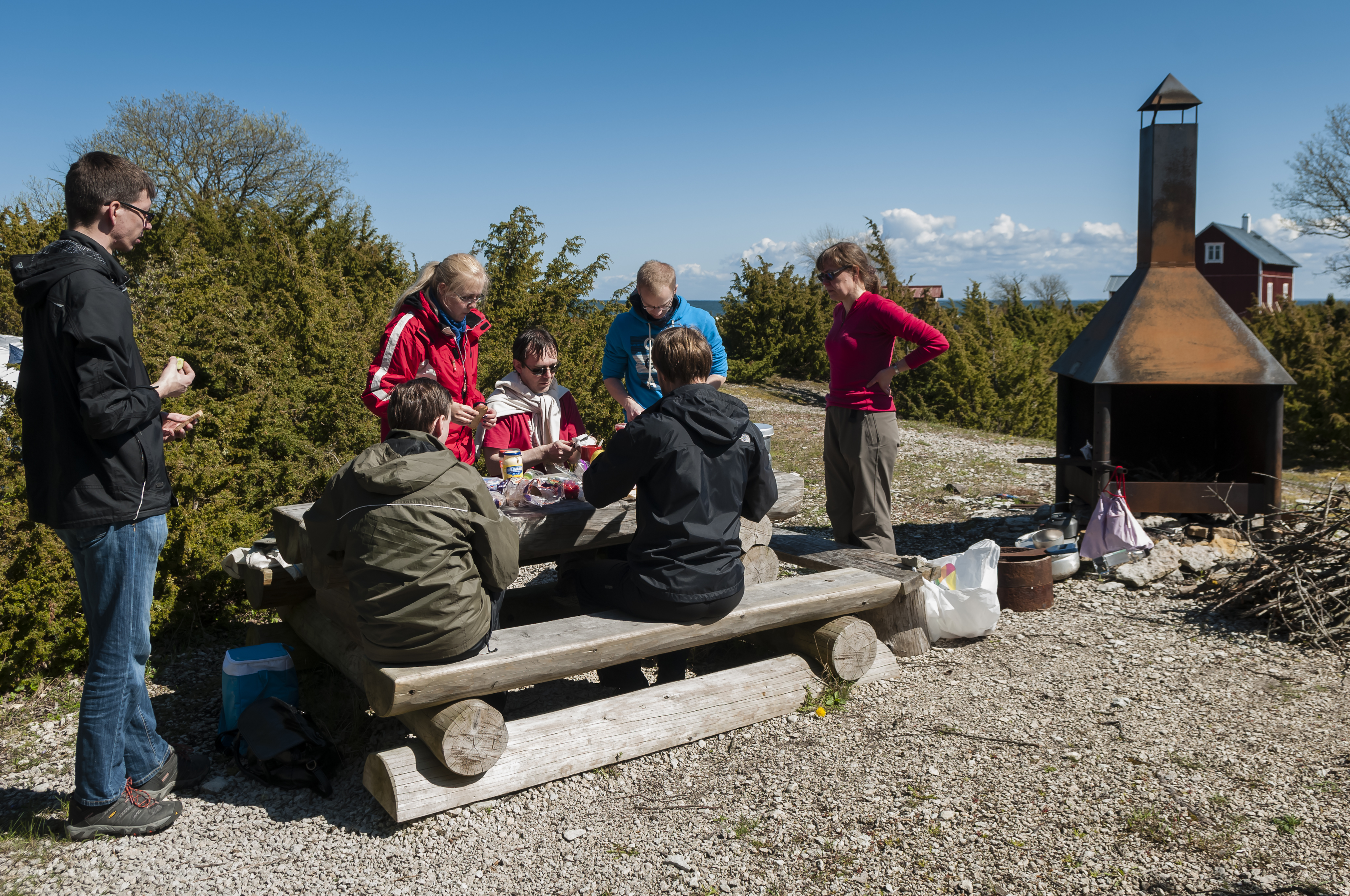 Osmussaare vikiekspeditsioon 2015.